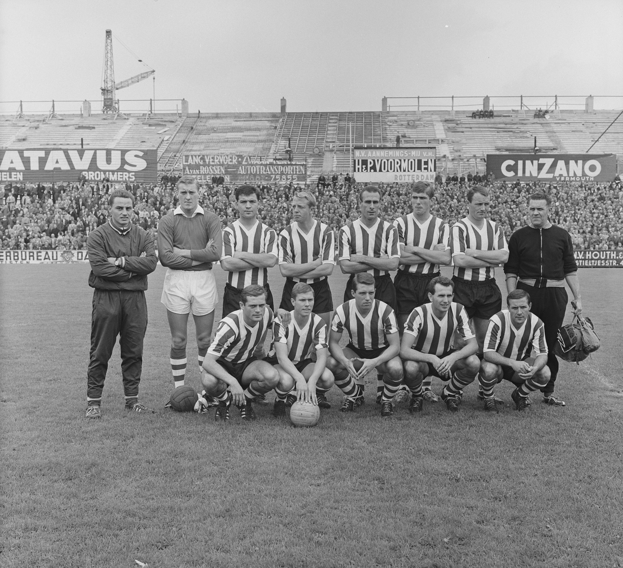 Elftal Sparta: De Visser, Pim Doesburg, Theo Laseroms, Tonnie van Ede, Hans Eijkenbroek, Verhoeven, Hofman, Sandor Popovics, Piet de Vries, Piet van Miert, Bela Bodnar, Rosselaar. Datum 26 augustus 1963